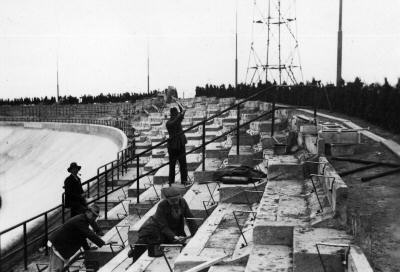 Old Galgenwaard Stadium